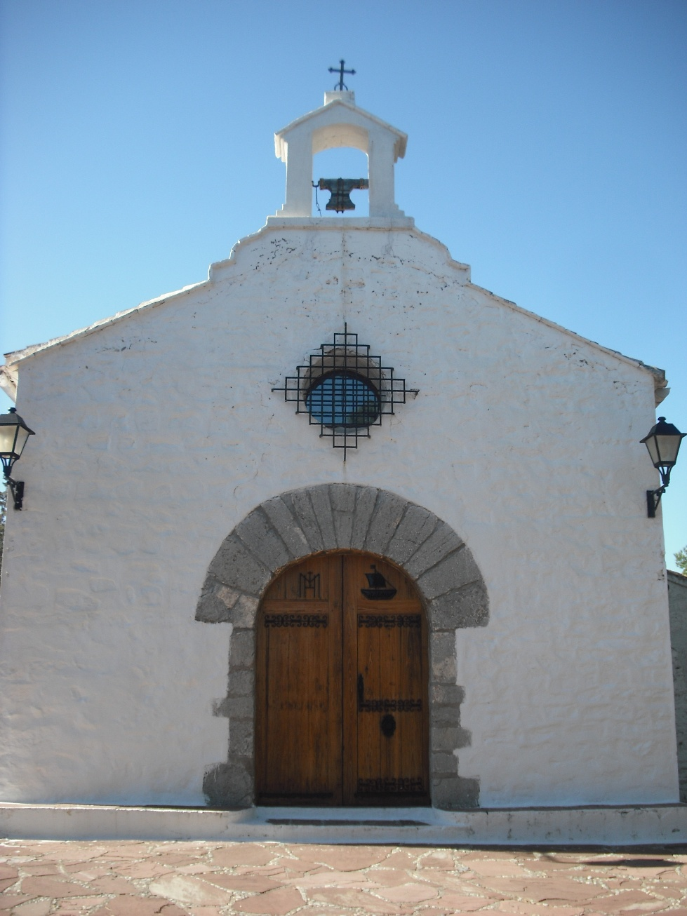 Fachada de la Ermita del Bon Succés de Benifairó de los Valles.